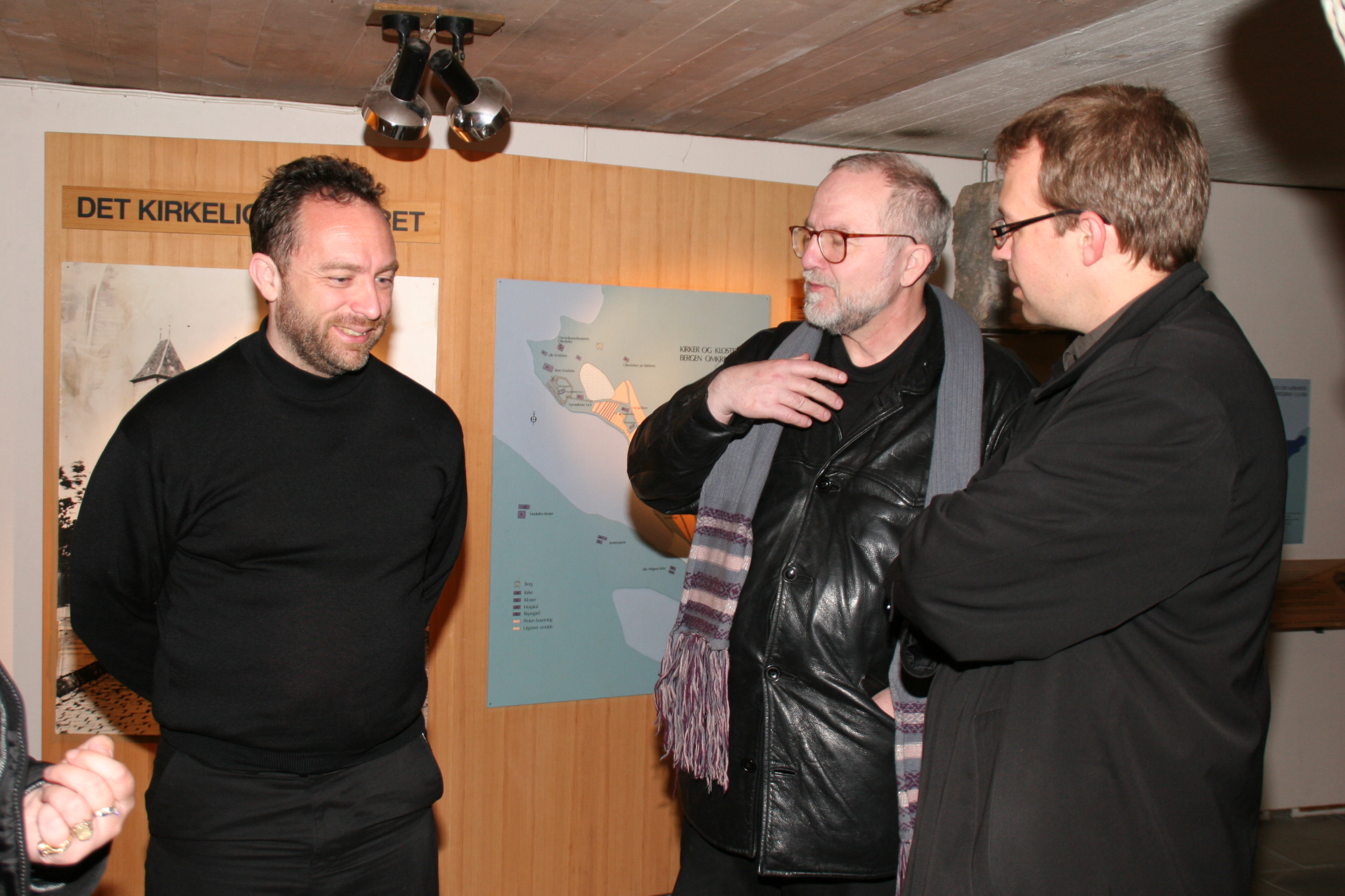 Jimmy Wales, Trond Øgrim og Per Øyvind Riise, Direktør Bymuseet i Bergen Photo: Holly Hui